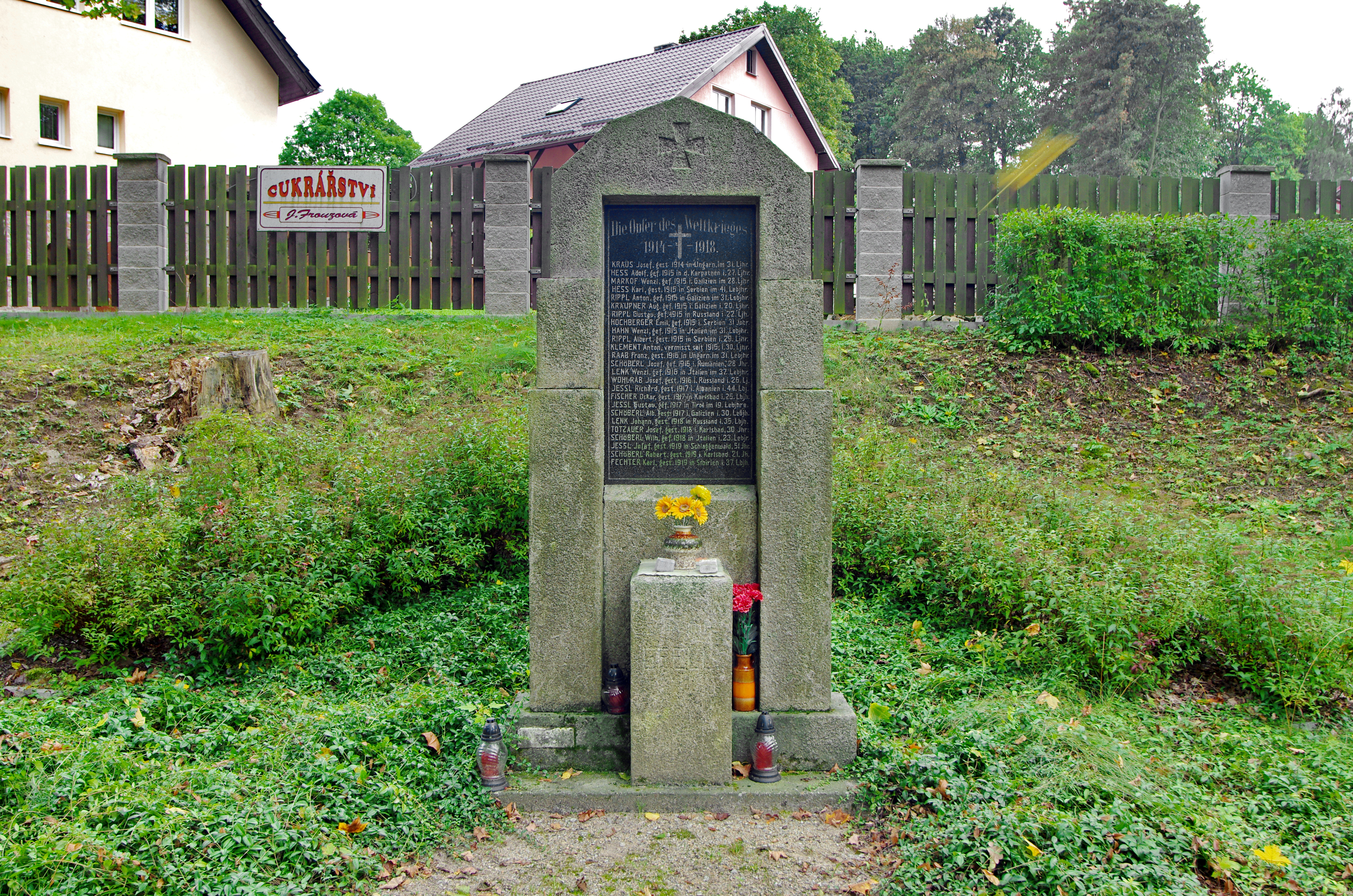 Kfely, osada obce Horní Slavkov, pomník obětem I. světové války, okres Sokolov